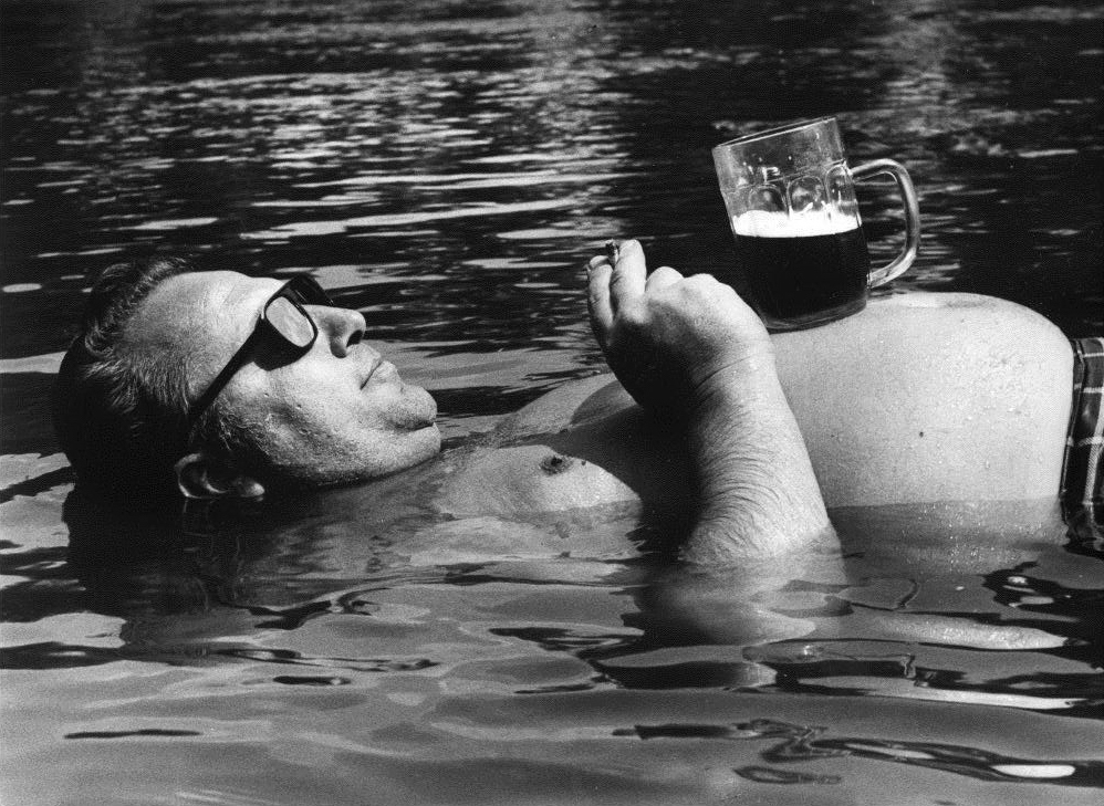 Fotografie z archivu Františka Dostála.